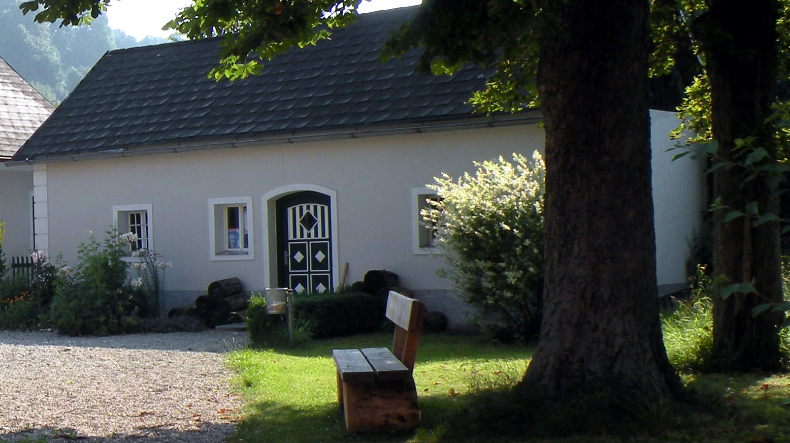 August Strindberg Museum im Markt Saxen im Machland im Bezirk Perg in Oberösterreich